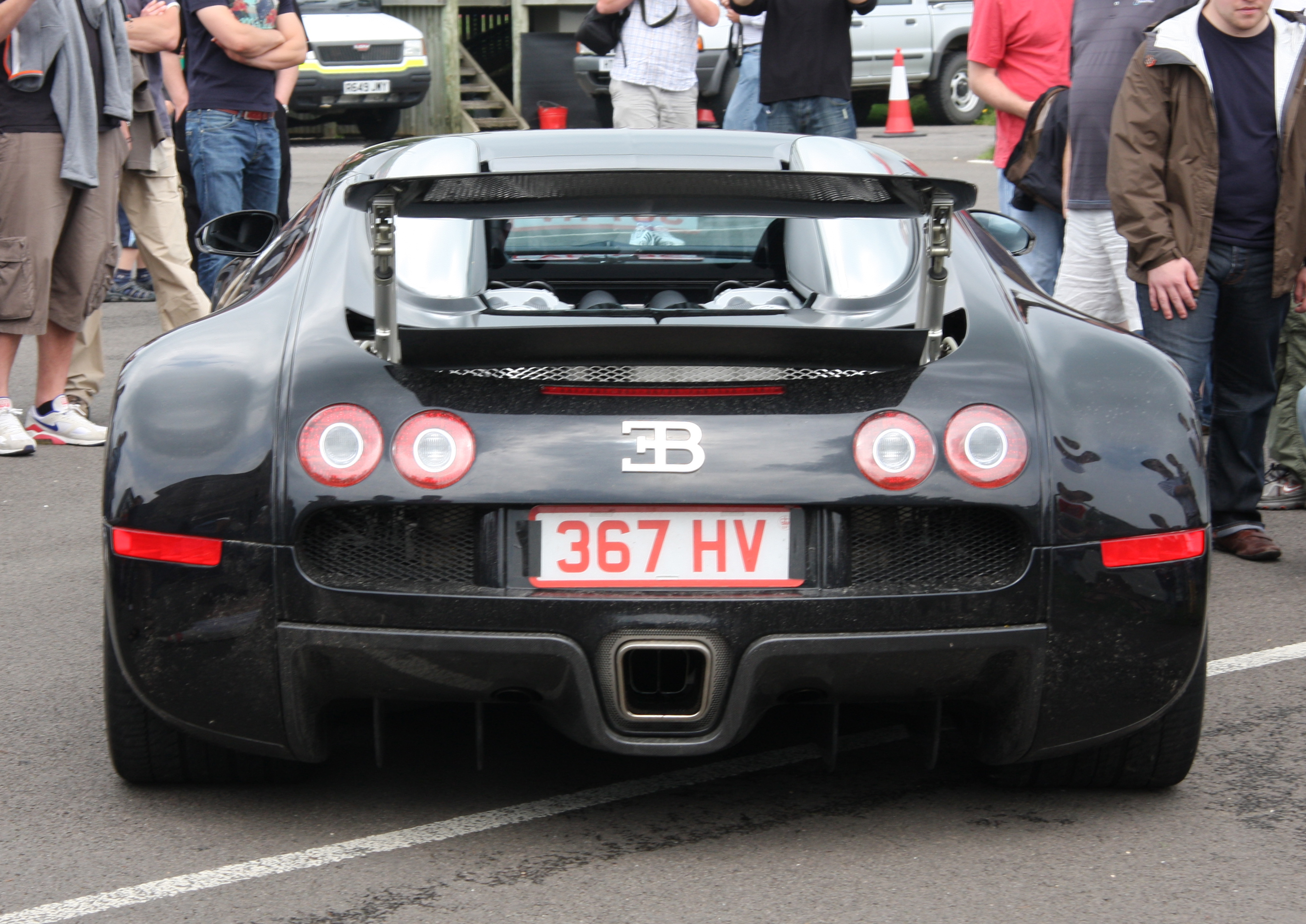 Bugatti Veyron